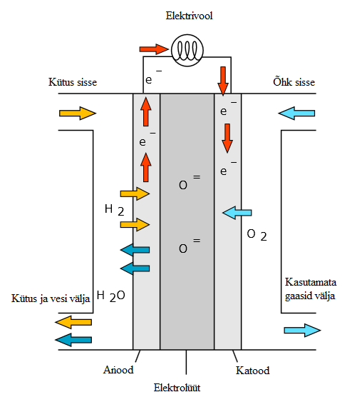 Tahkeoksiidse kütuseelemendi tööskeem